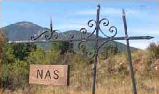 Antic rétol d'entrada a Nas